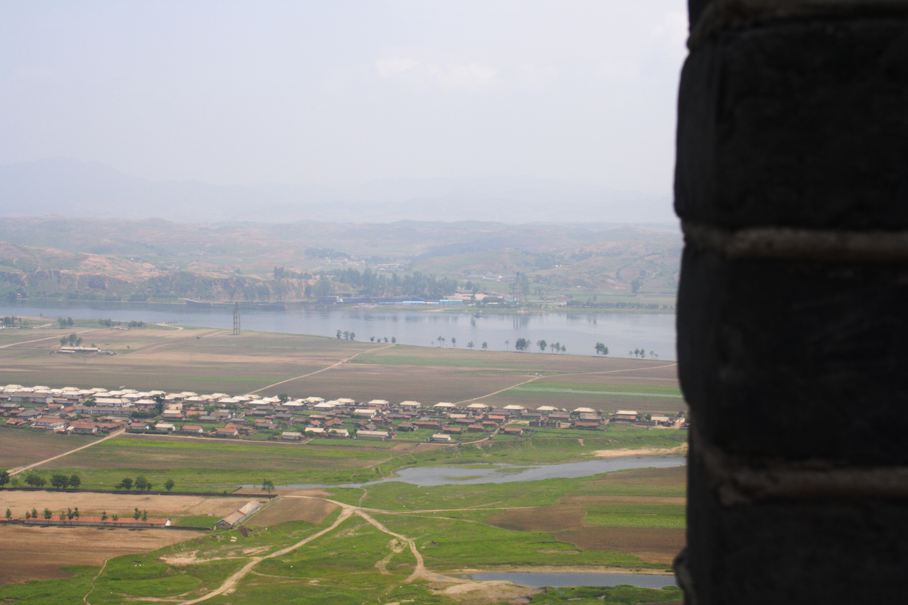 Dallo spezzone più orientale della Grande Muraglia cinese si getta lo sguardo sulla pianura coreana. Hushan Changcheng China, 2009-06-14